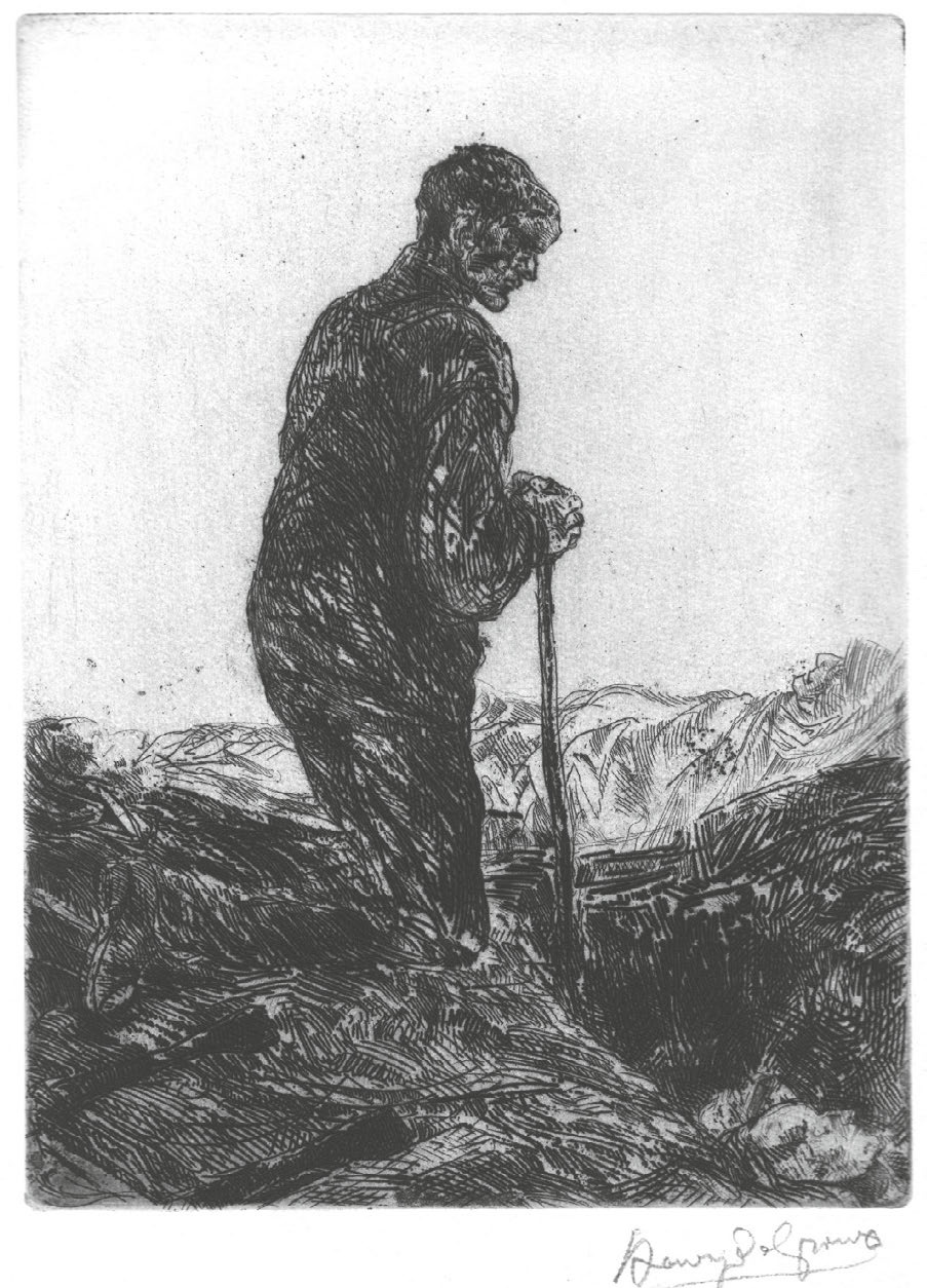 Dies irae by Henry de Groux